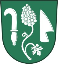 Znak obce zlechov